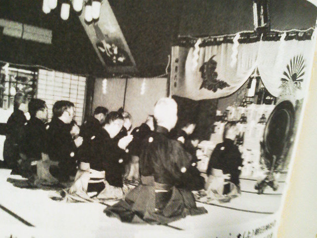 お祭の様子